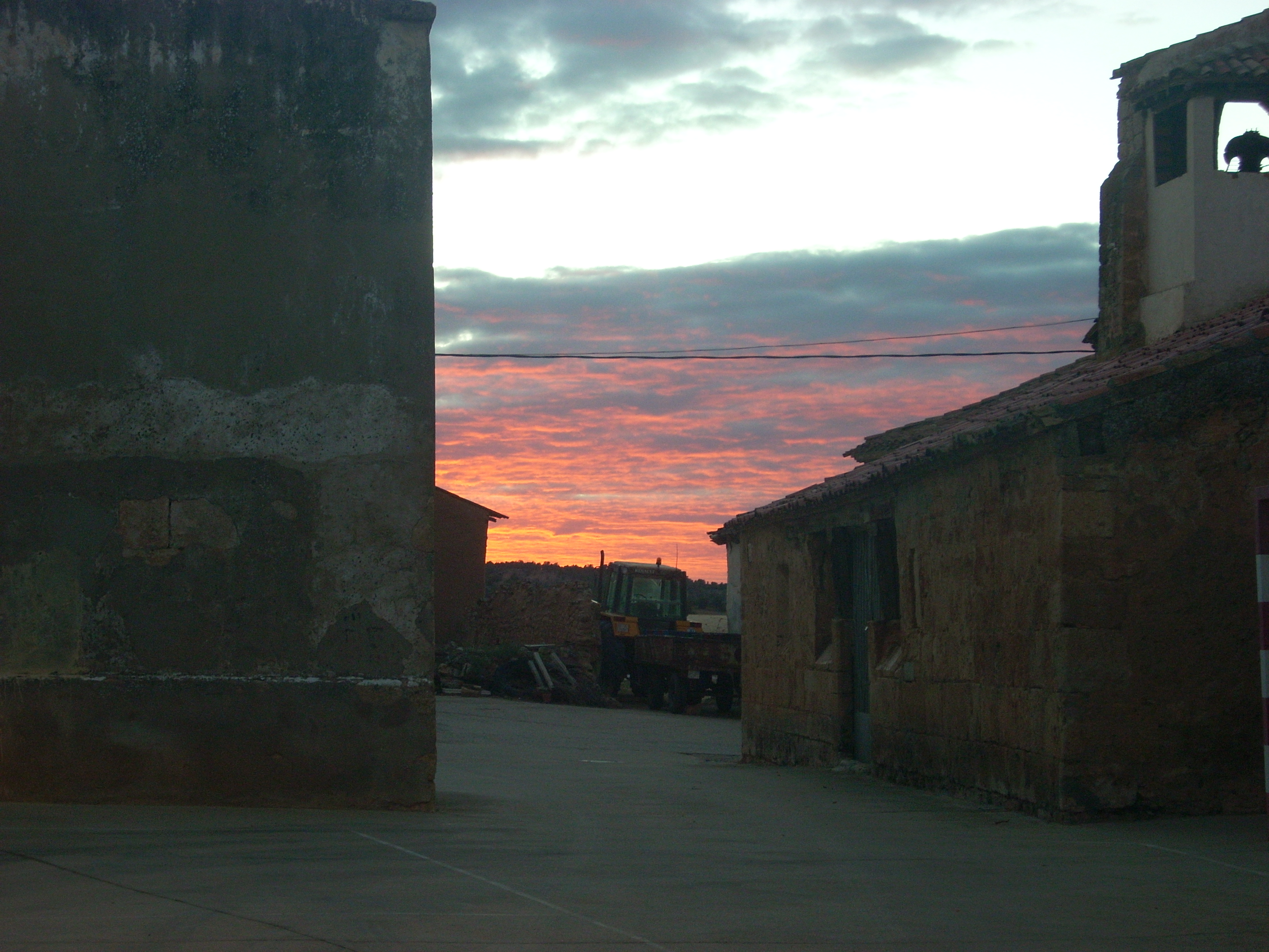 Atardecer en Morales desde la plaza del pueblo